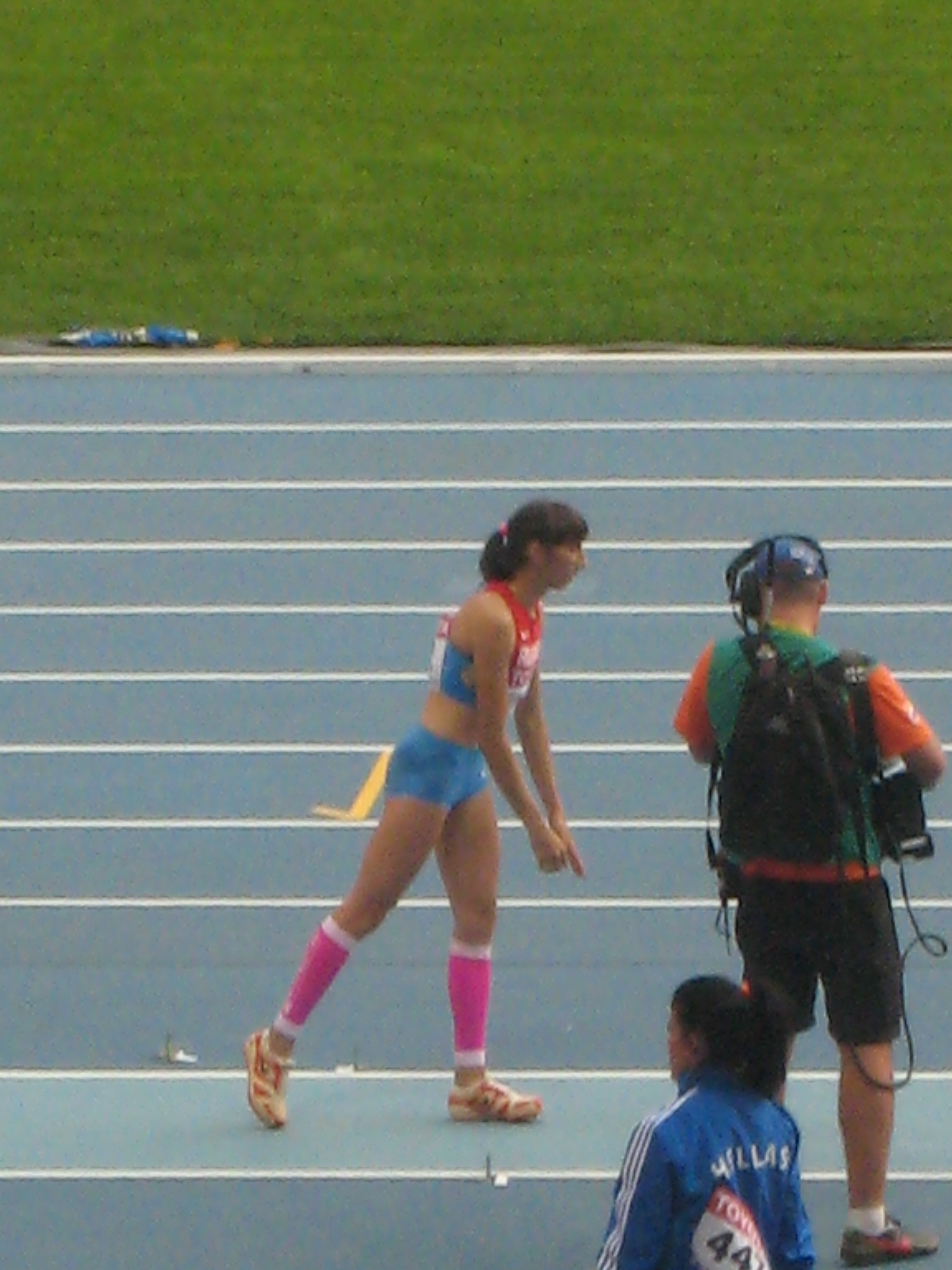 Чемпионат мира по лёгкой атлетике 2013. Российская спортсменка Екатерина Конева